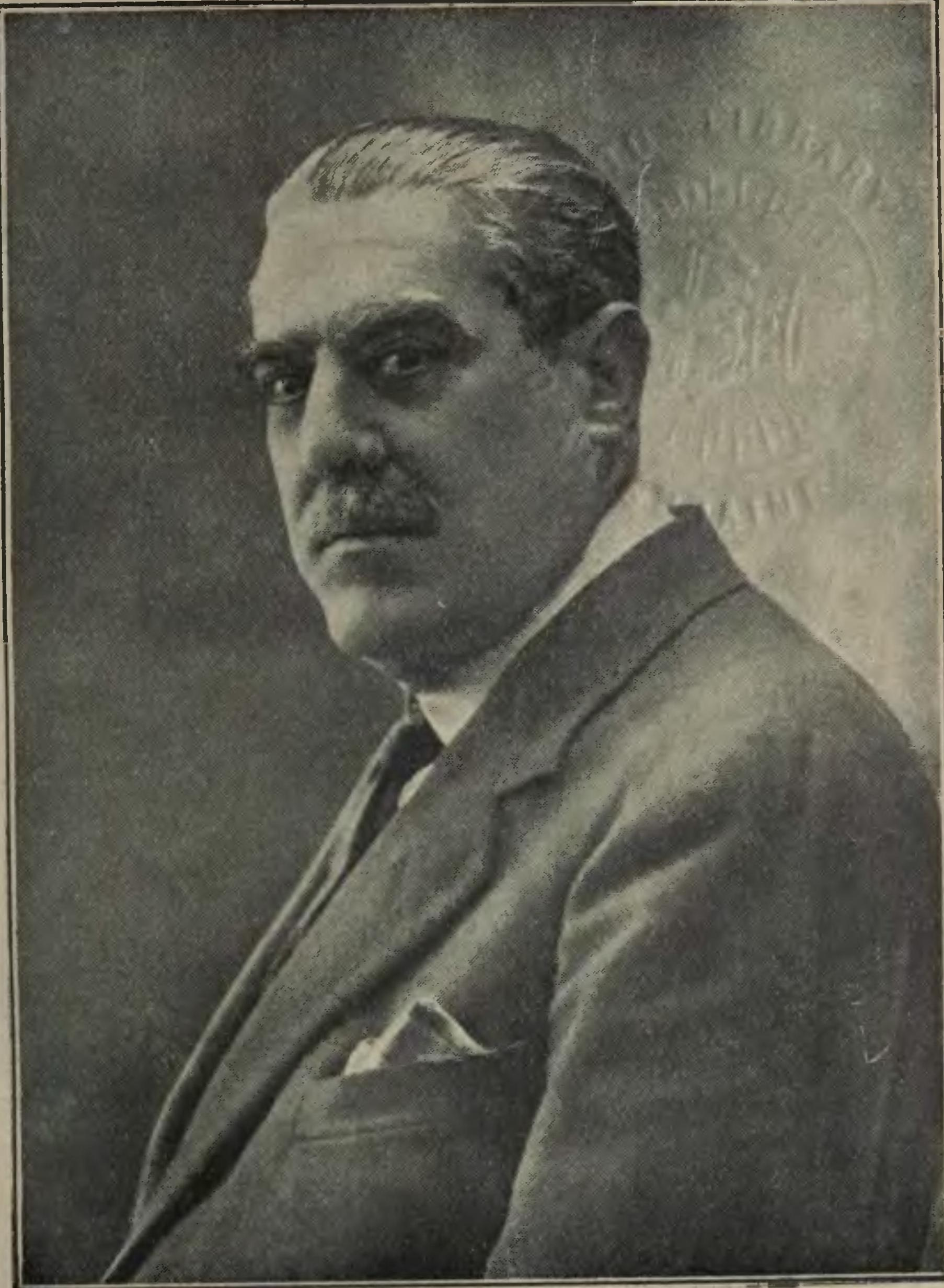 La imagen de Emilio Bobadilla forma parte del libro Image:Rojeces de Marte.djvu en la página 9